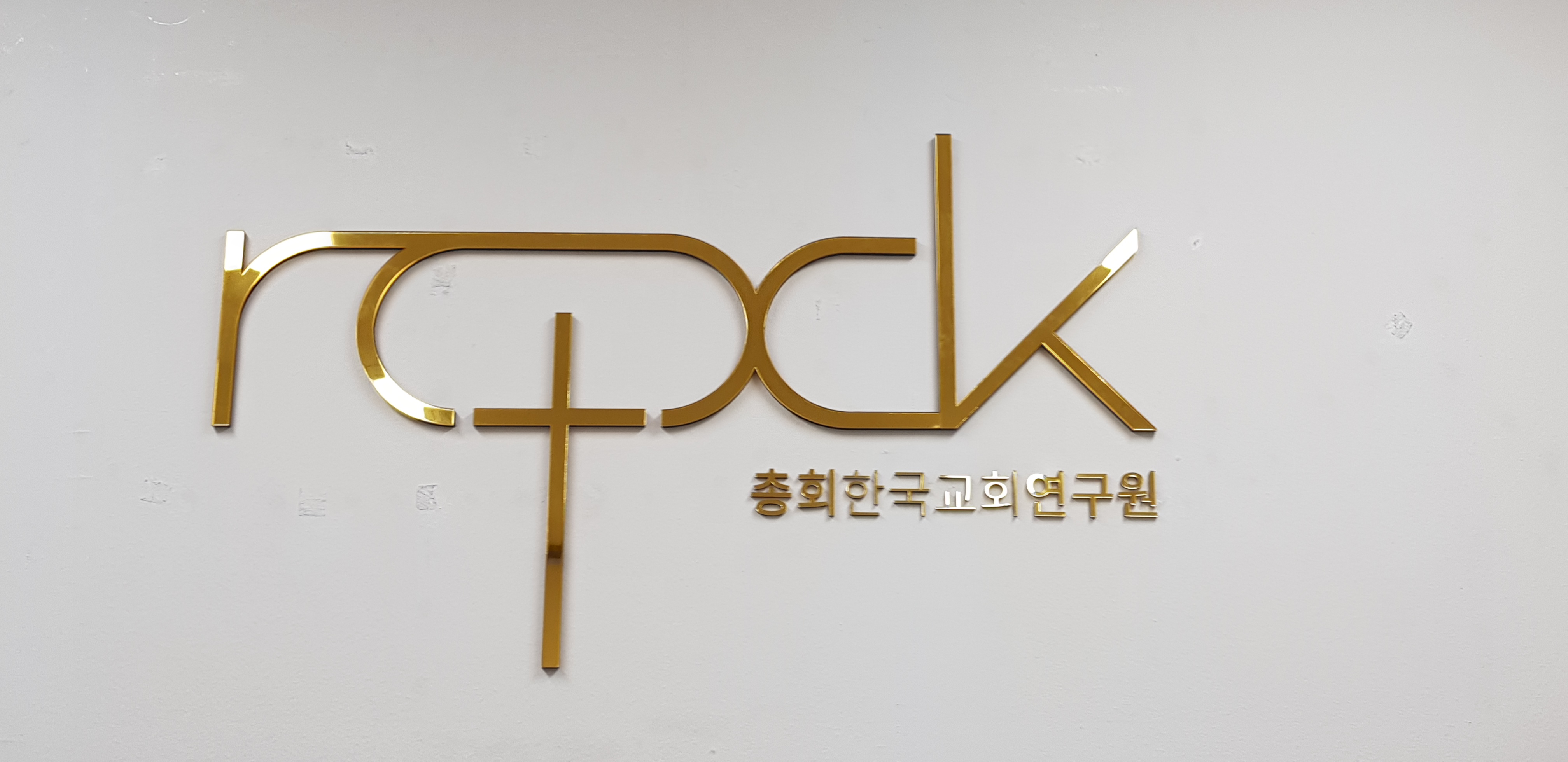 총회한국교회연구원 마크